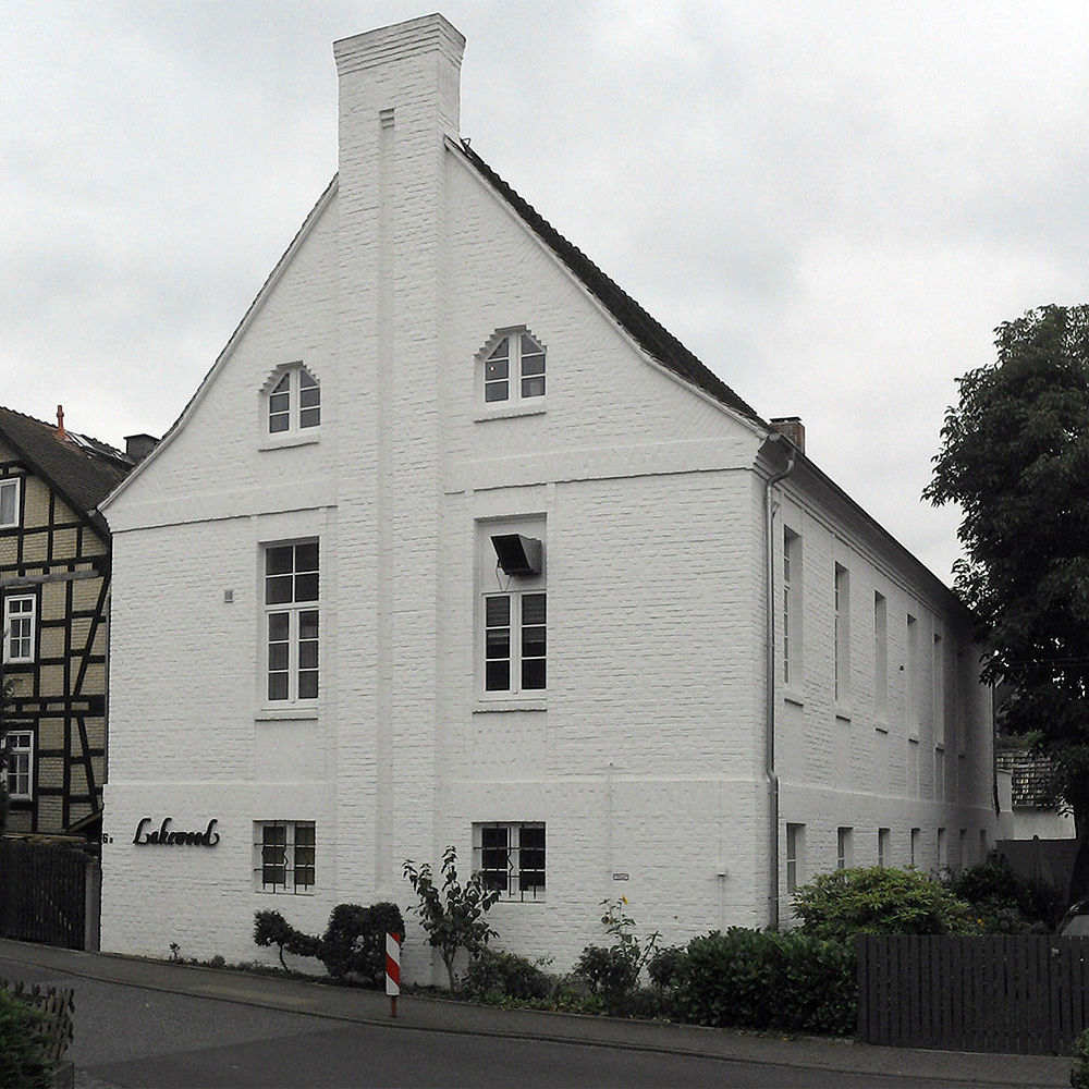 Die Lakewood Manufaktur in einer ehemaligen Zigarrenfabrik in Rödgen, einem Vorort von Gießen (Mittelhessen)